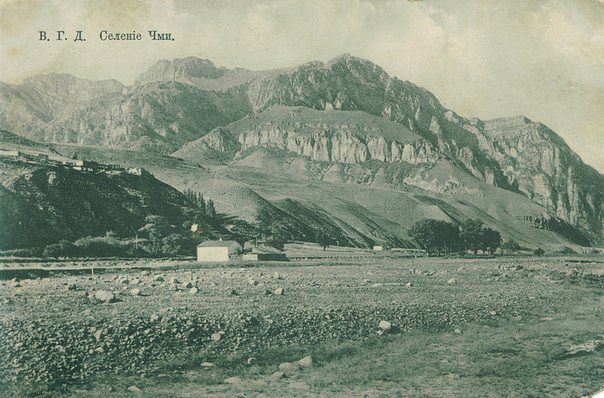 Нохчийн: Село Чми